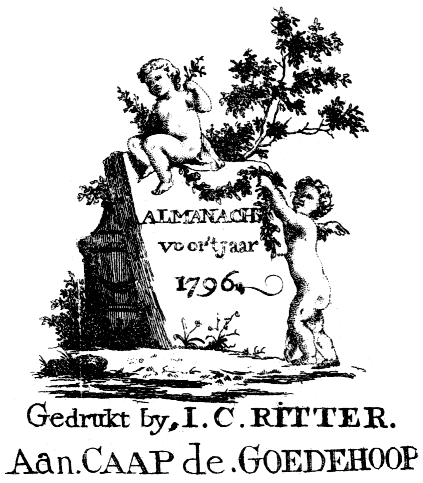 Extract from "Almanach voor't jaar 1976"